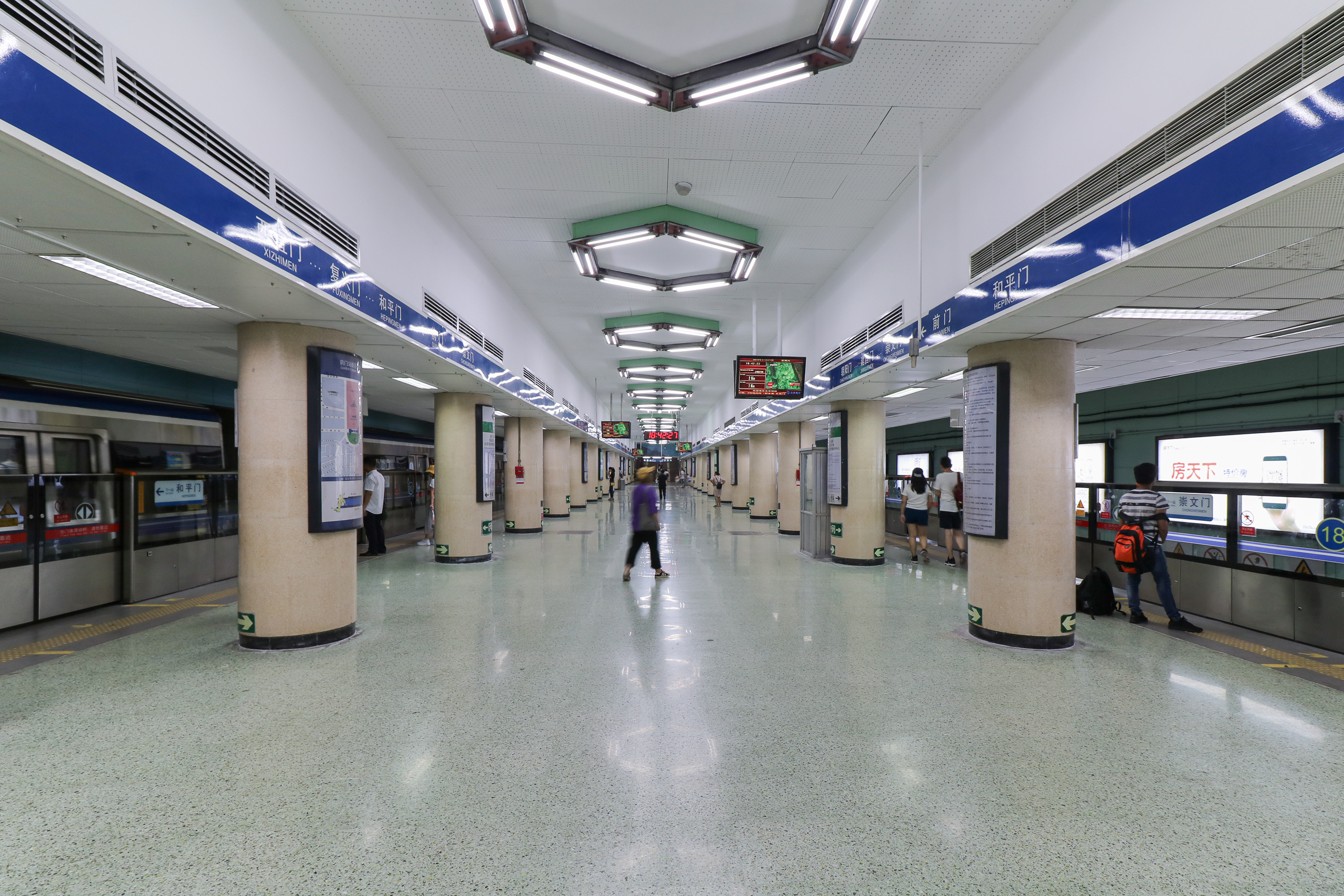 中文（中国大陆）: 北京地铁2号线前门站